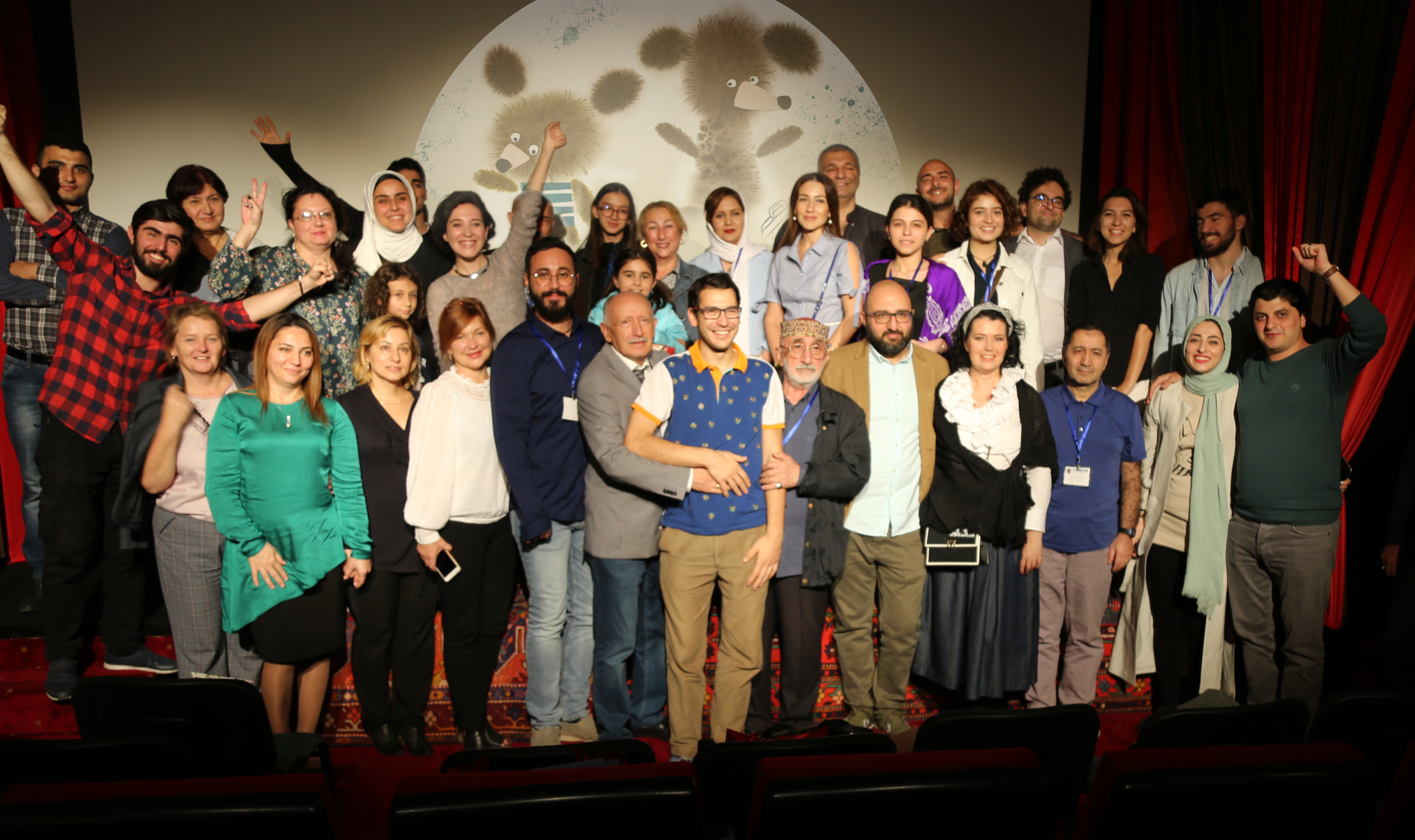 Participants of 2nd ANİMAFİLM